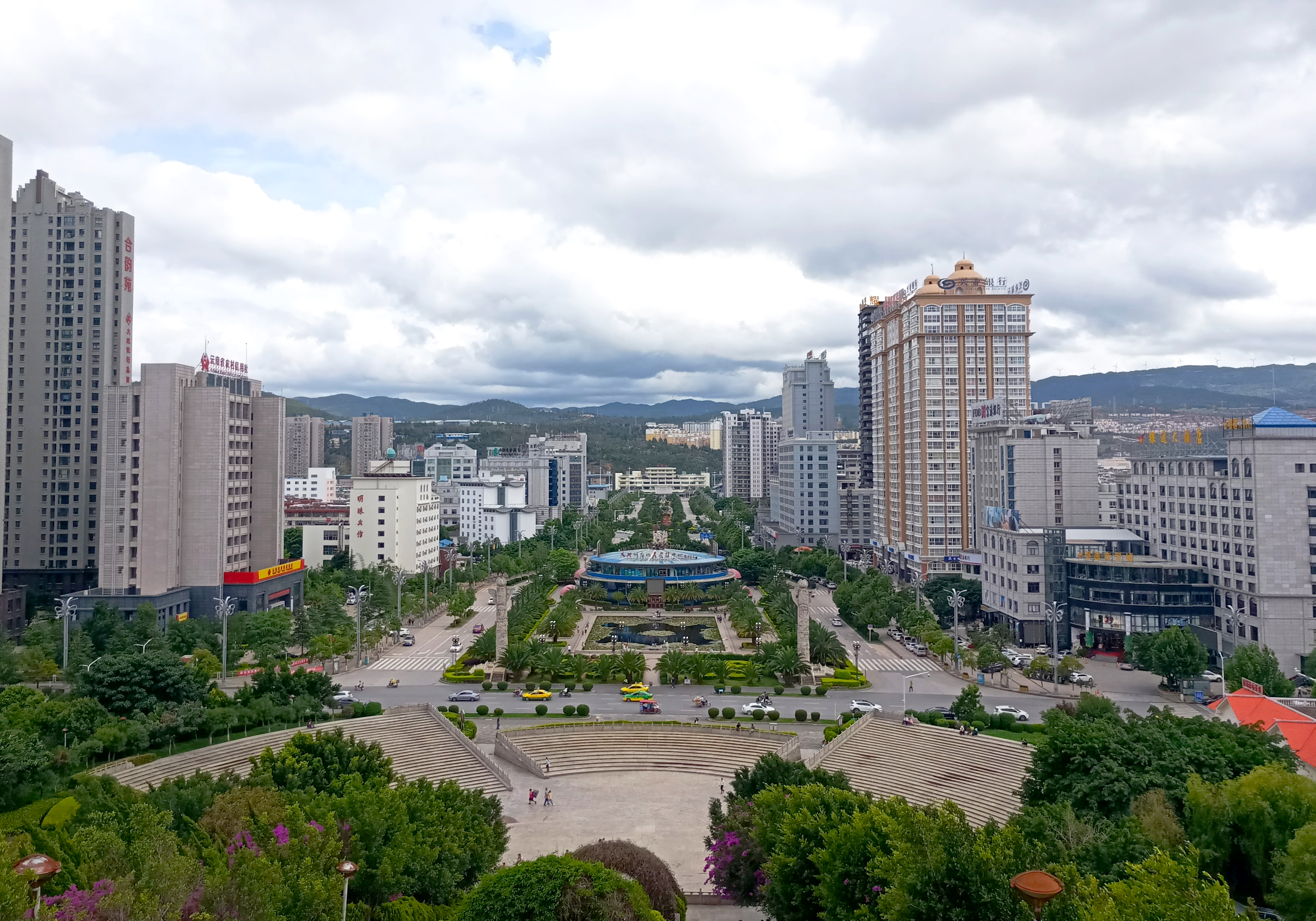 中文（中国大陆）: 大理市-云岭大道